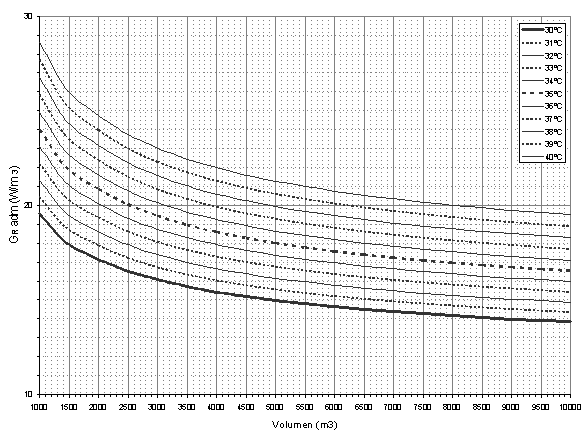 Grafico valores admisibles de Gref para edificio tipo bloque. Normas IRAM Argentina.